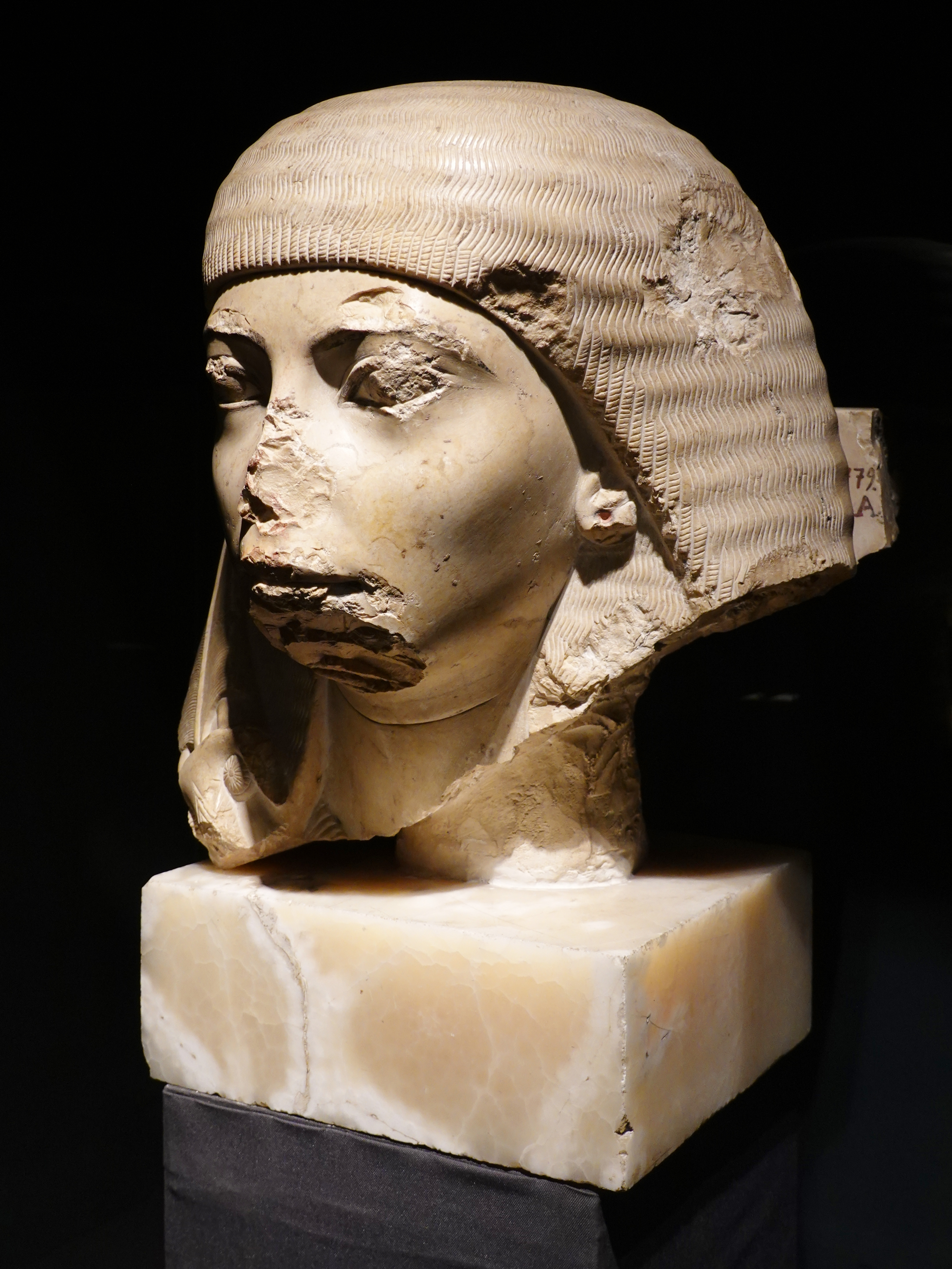 Statuenkopf des Nachtmin, königlicher Schreiber und Armeegeneral unter Tutanchamun und Eje II., Erbe und möglicherweise Sohn von König Eje II. (Kalkstein, 18. Dynastie), unbekannter Herkunft, ausgestellt im Luxor-Museum, Ägypten